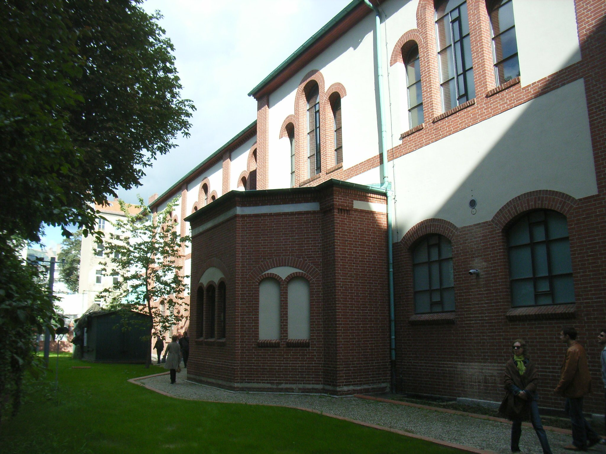 Synagoge Rykestraße in Berlin-Prenzlauer Berg (Deutschland), Westseite mit Laubhütte